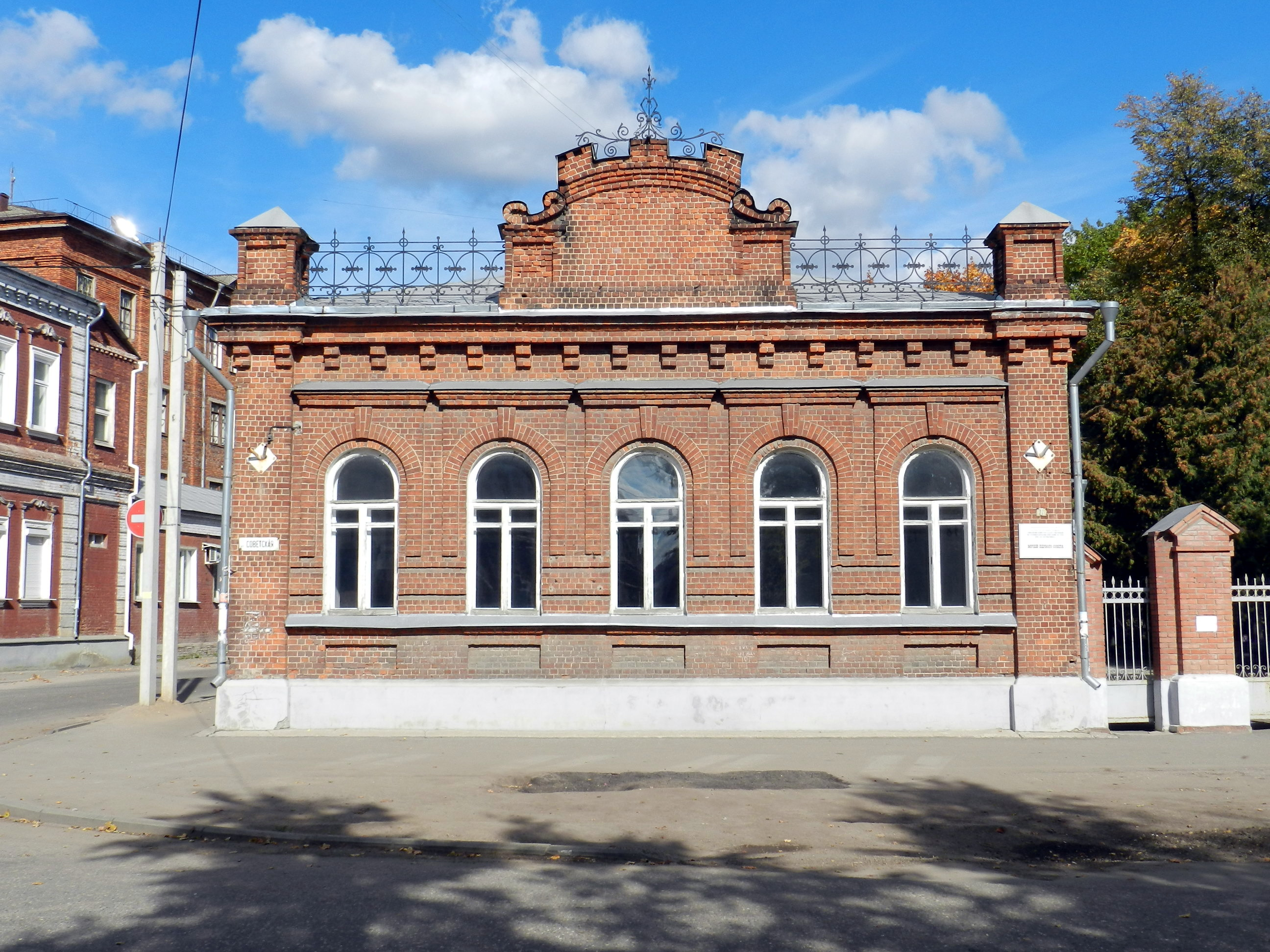 дом, в котором проходили заседания одного из первых в России Советов рабочих депутатов в 1905 году: улица Советская, 27, Иваново, Ивановская область